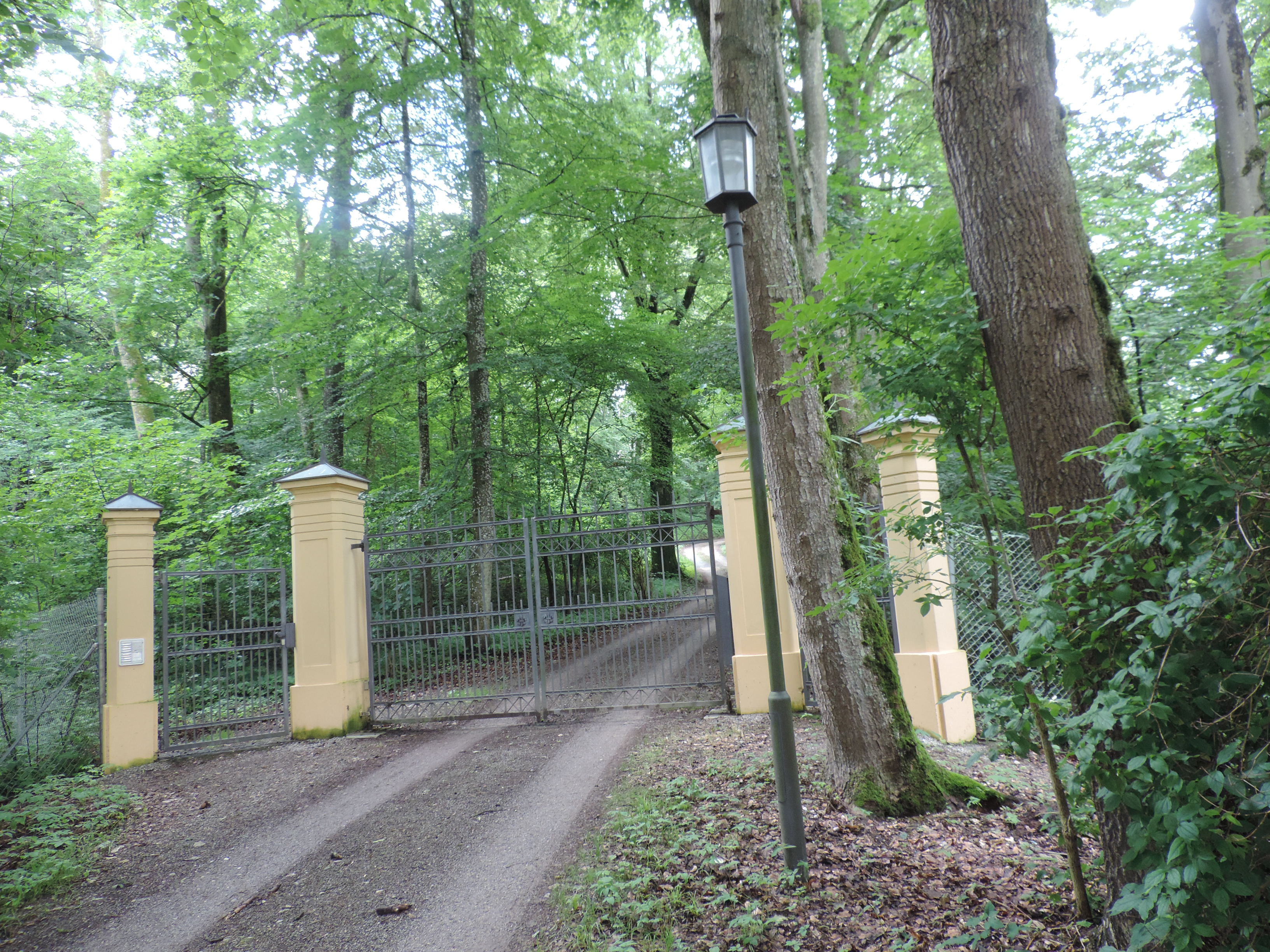 Schlossportal Wellenburg